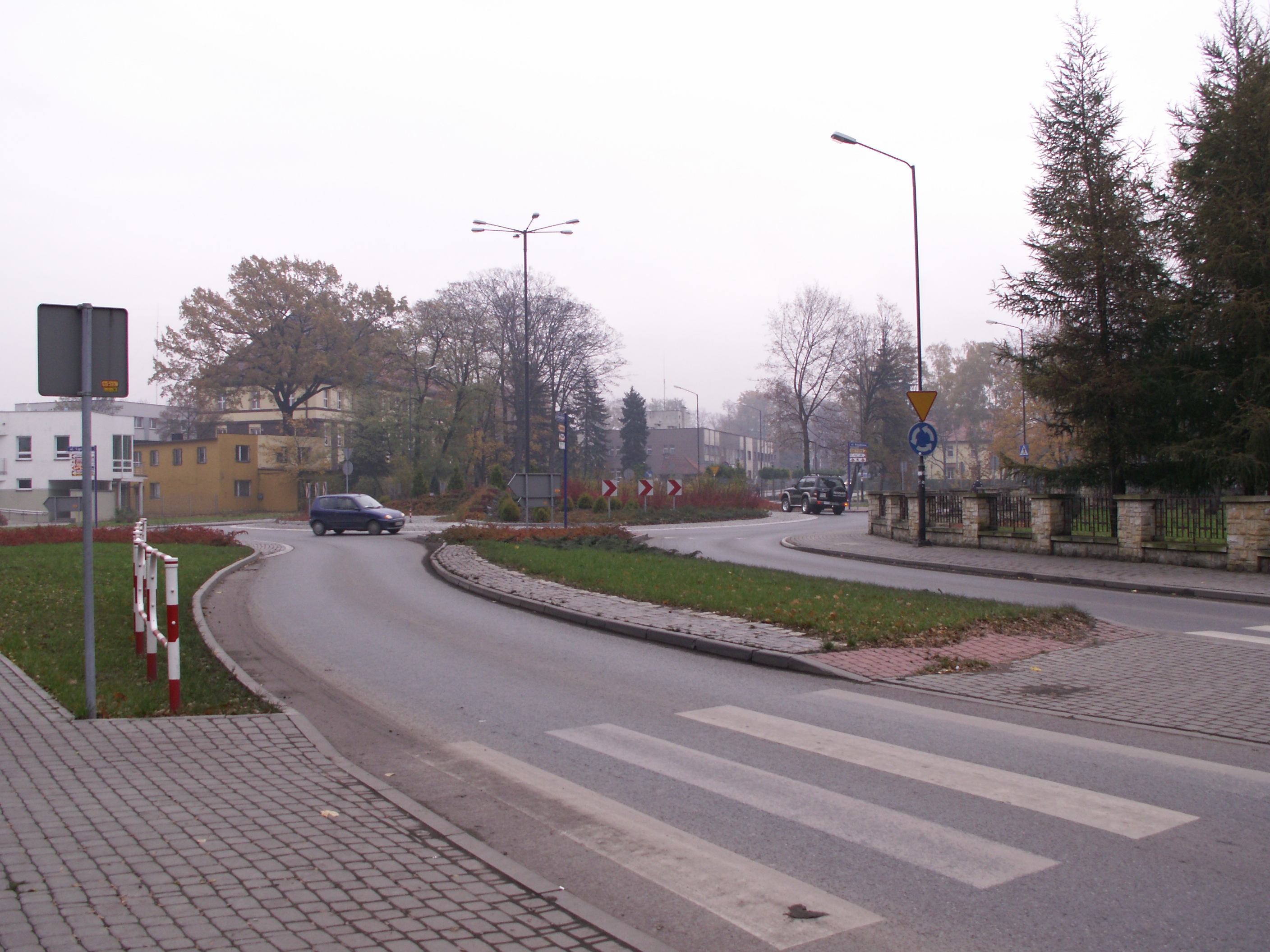 Niedawno wybudowane knurowskie rondo im. Jana Pawła II.